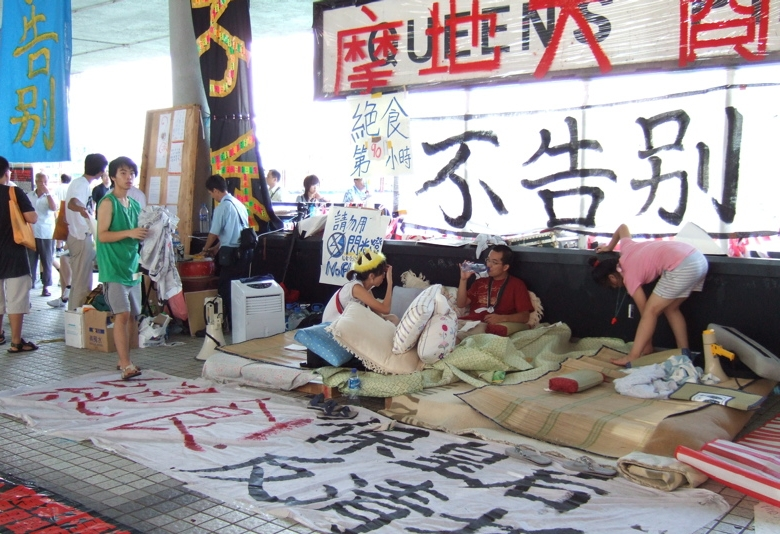 Queen's Pier hunger strikers' encampment